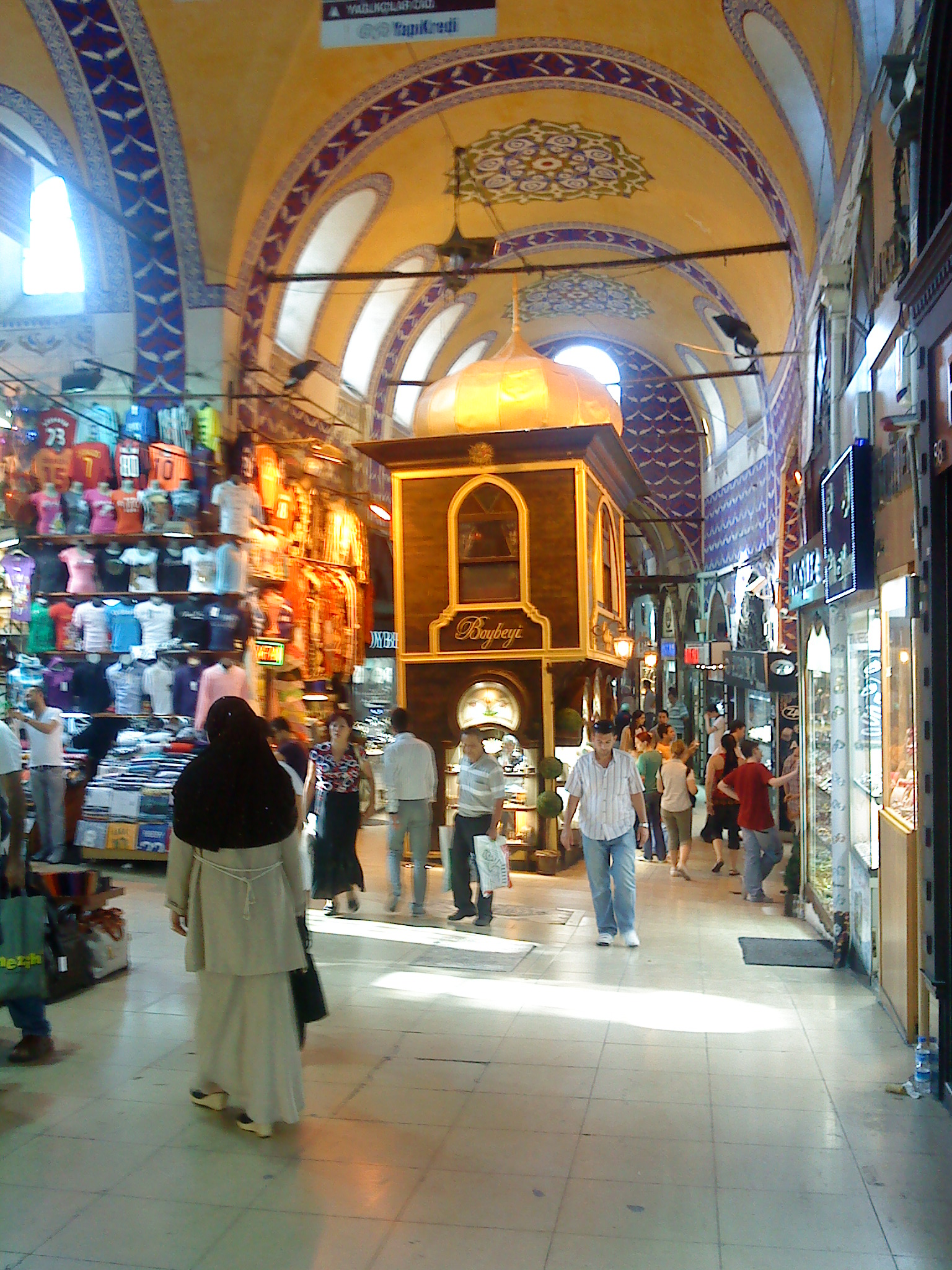 Estambul, Turquía. Gran Bazar.